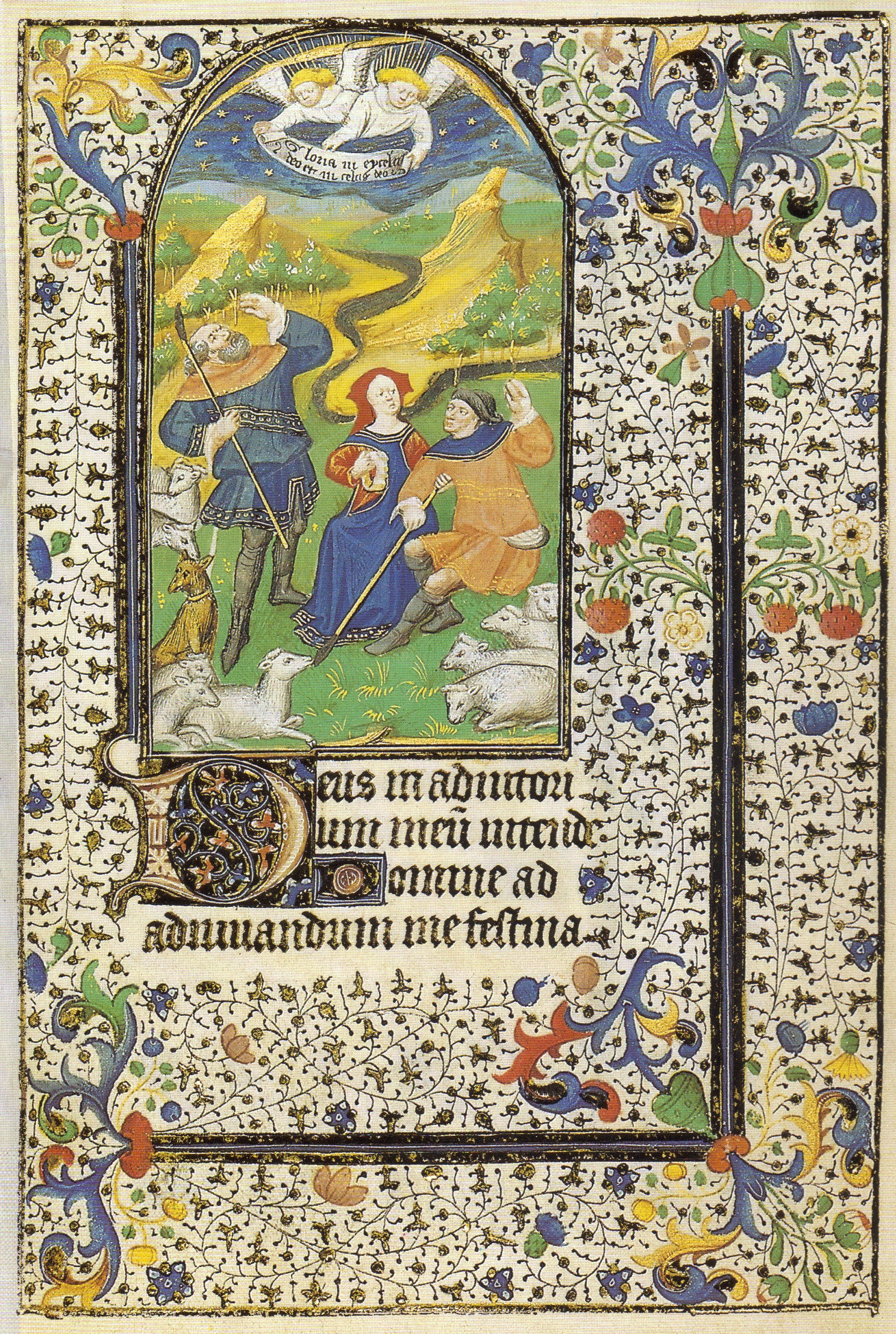 Stundenbuch (Paris, um 1450), Stadtbibliothek Mainz Hs I 440. Psalm 69:2 (Vulgate): "Deus in adiutorium meum intende Domine ad adiuvandum me festina".